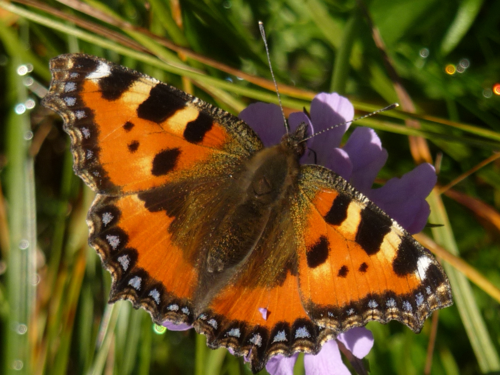 Ein "Kleiner Fuchs" auf einer Almwiese im Allgäu.